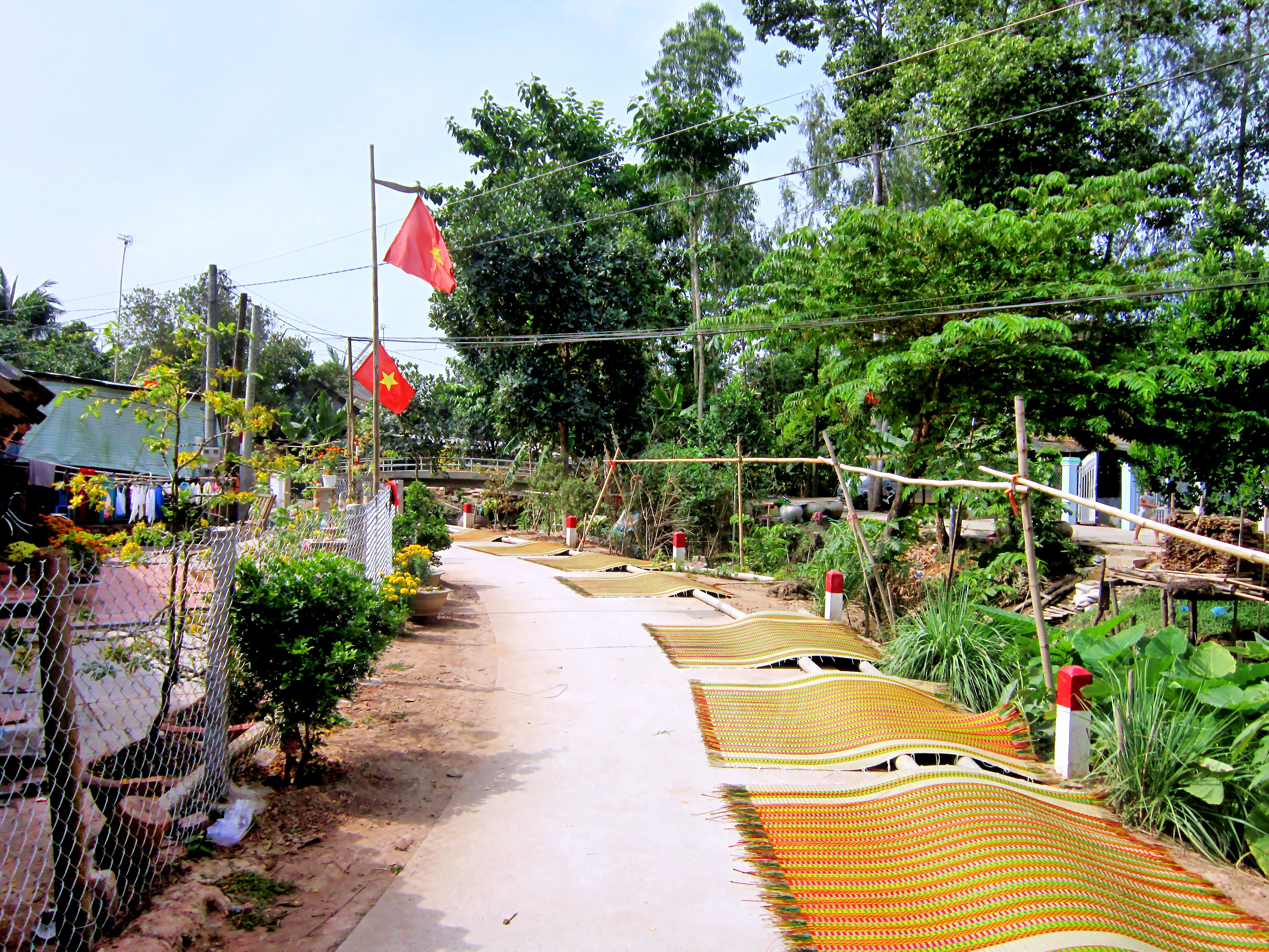 Một cảnh ở làng chiếu Định Yên, thuộc huyện Lấp Vò, tỉnh Đồng Tháp, Việt Nam.